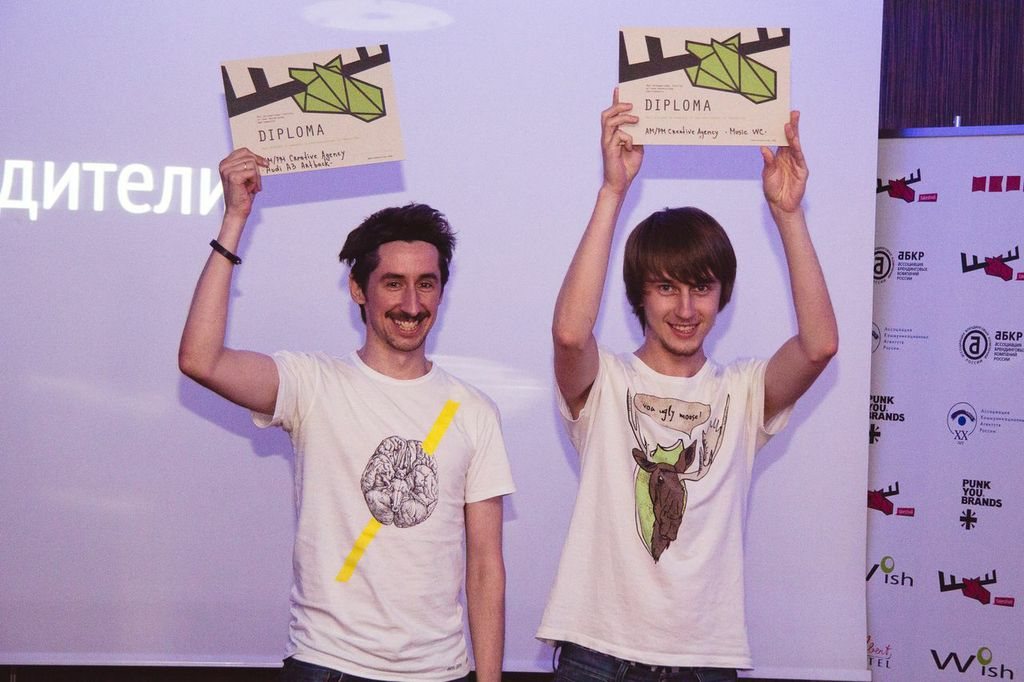 Победители Fakestival в 2013 году.